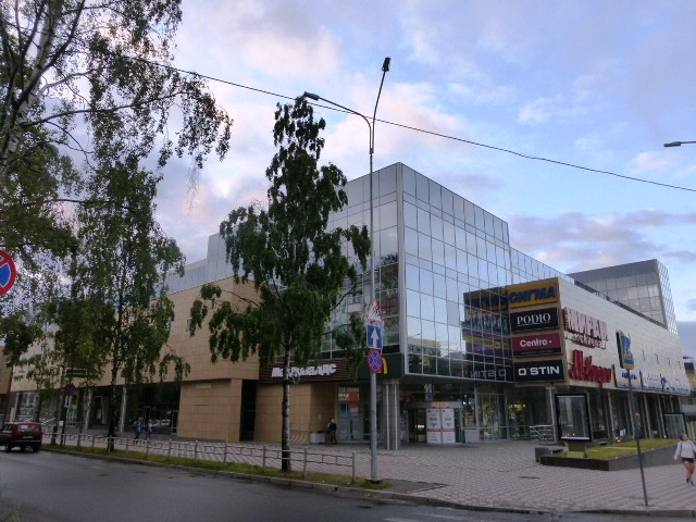 Торговый центр "Макси" на пр.Ленина в Петрозаводске